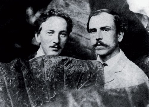 Otakar Nejedlý (1883-1957) a Jaroslav Hněvkovský v roce cca 1922